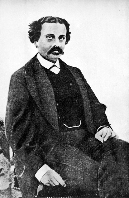 Alexandru Odobescu (1834-1895), scriitor român